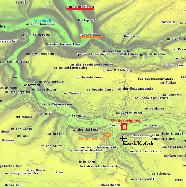 Cette carte du village de Koerich axée sur la topographie et les toponymes met en évidence des endroits importants du Moyen-âge et de l'Ancien Régime: les deux châteaux avec leurs moulins banaux respectifs, ainsi que l'église.